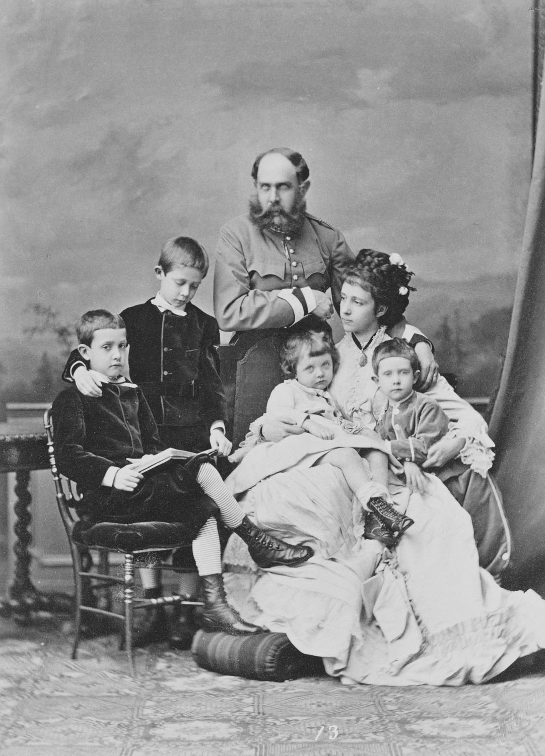 Familie von Karl Ludwig von Österreich.